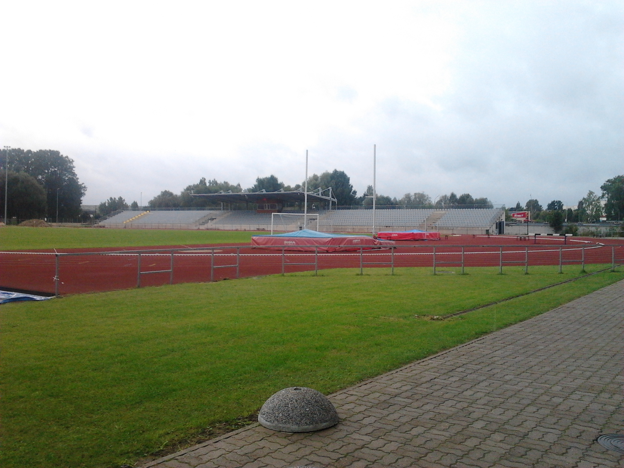 A Võru Spordikeskus (Võru Sportközpont) futballpályája.